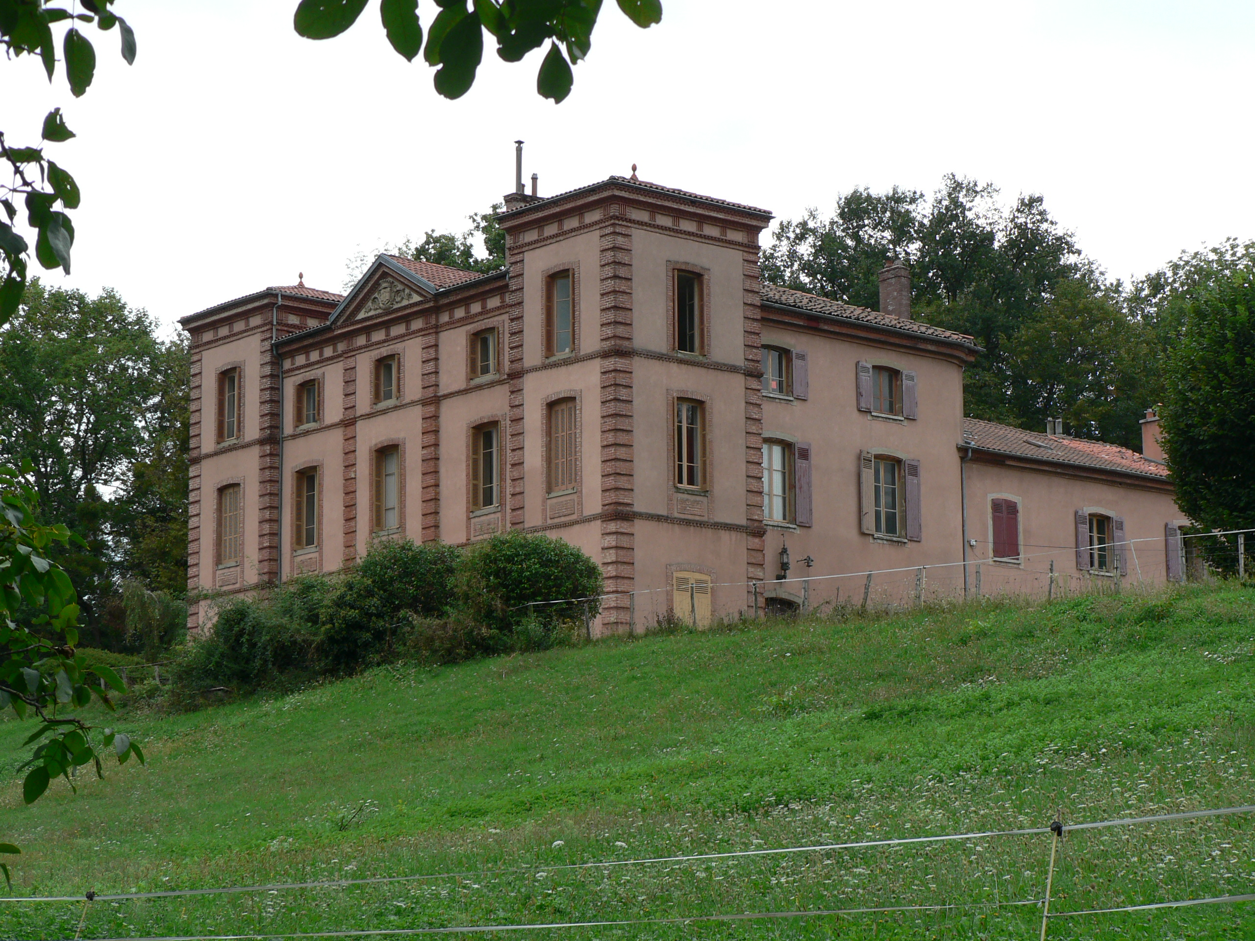 Château de la Motte, (Inscrit, 1927)